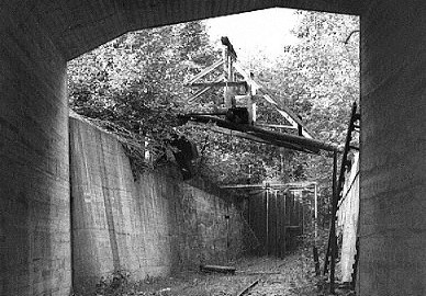 Järnvägsspår in i tunneln till anrikningsverket i Lekomberg samt tappficka